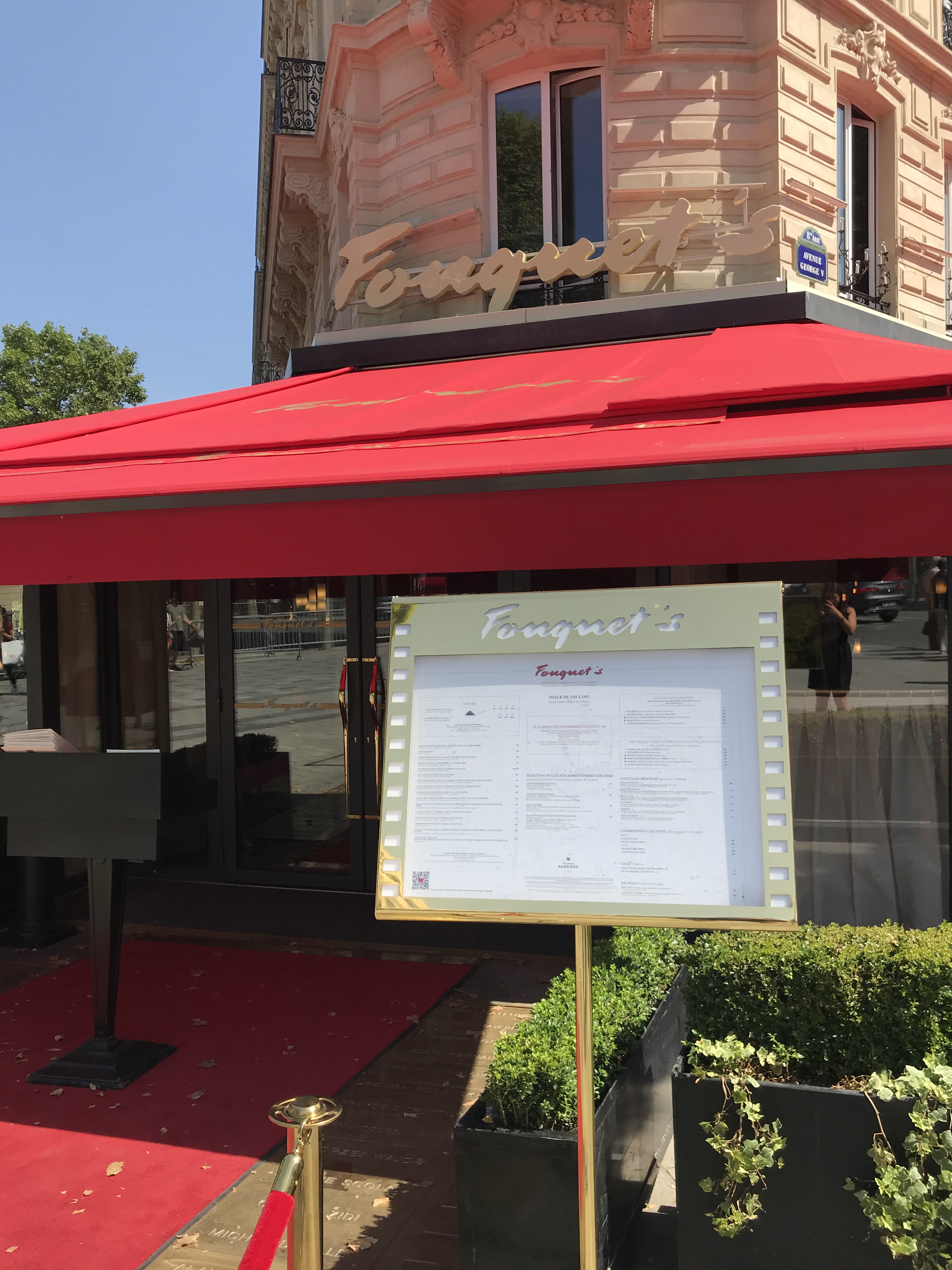 entrée du Fouquet's Paris - Champs-Elysées